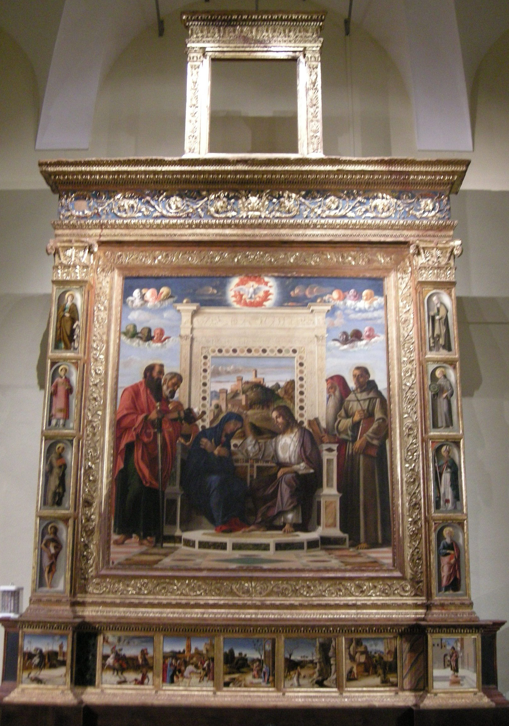 Bellini, pala di pesaro